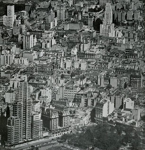 Template:El centro de la ciudad de Buenos Aires en 1936.